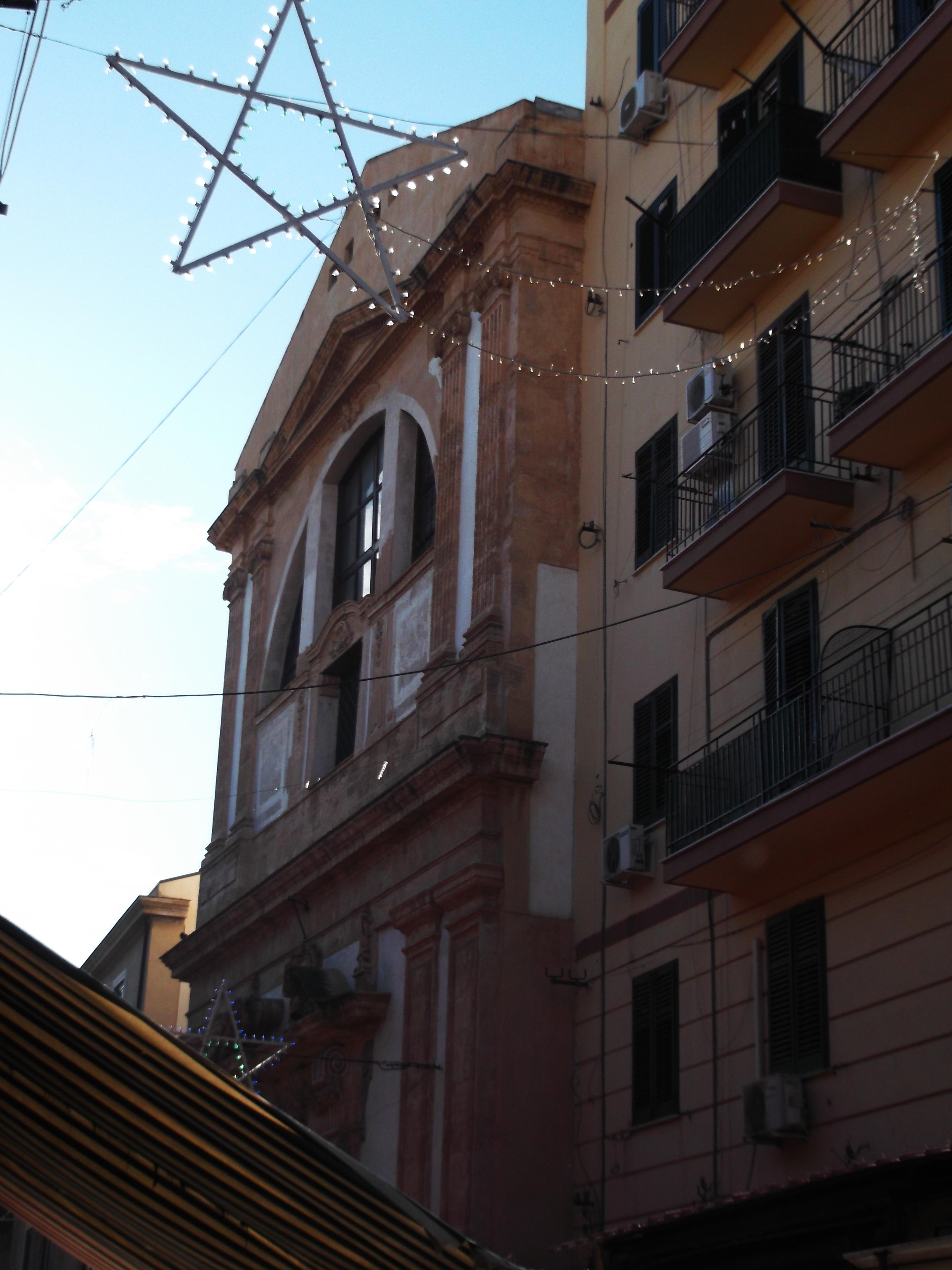 facciata